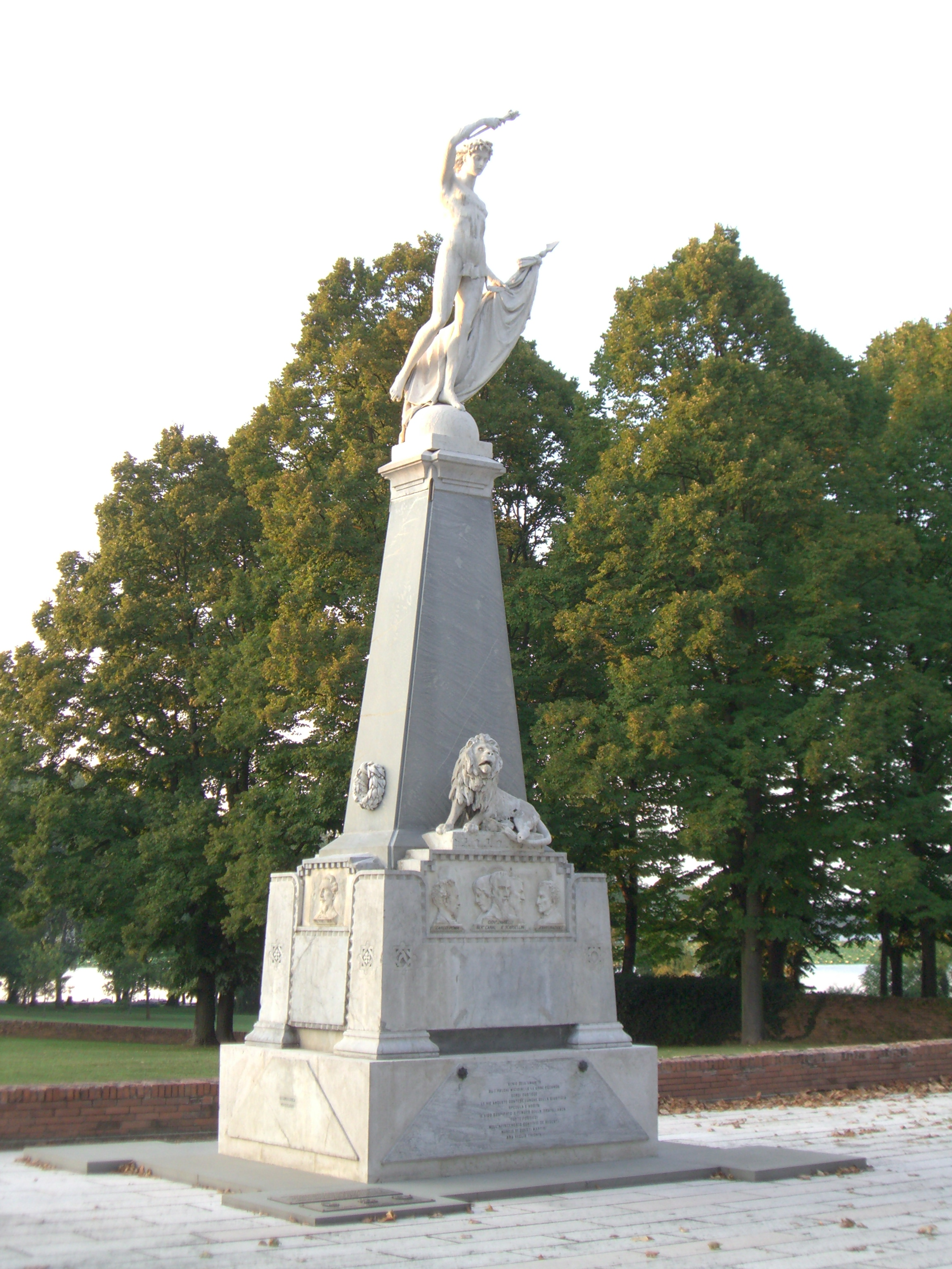 Autore: Giovanni Bufalo